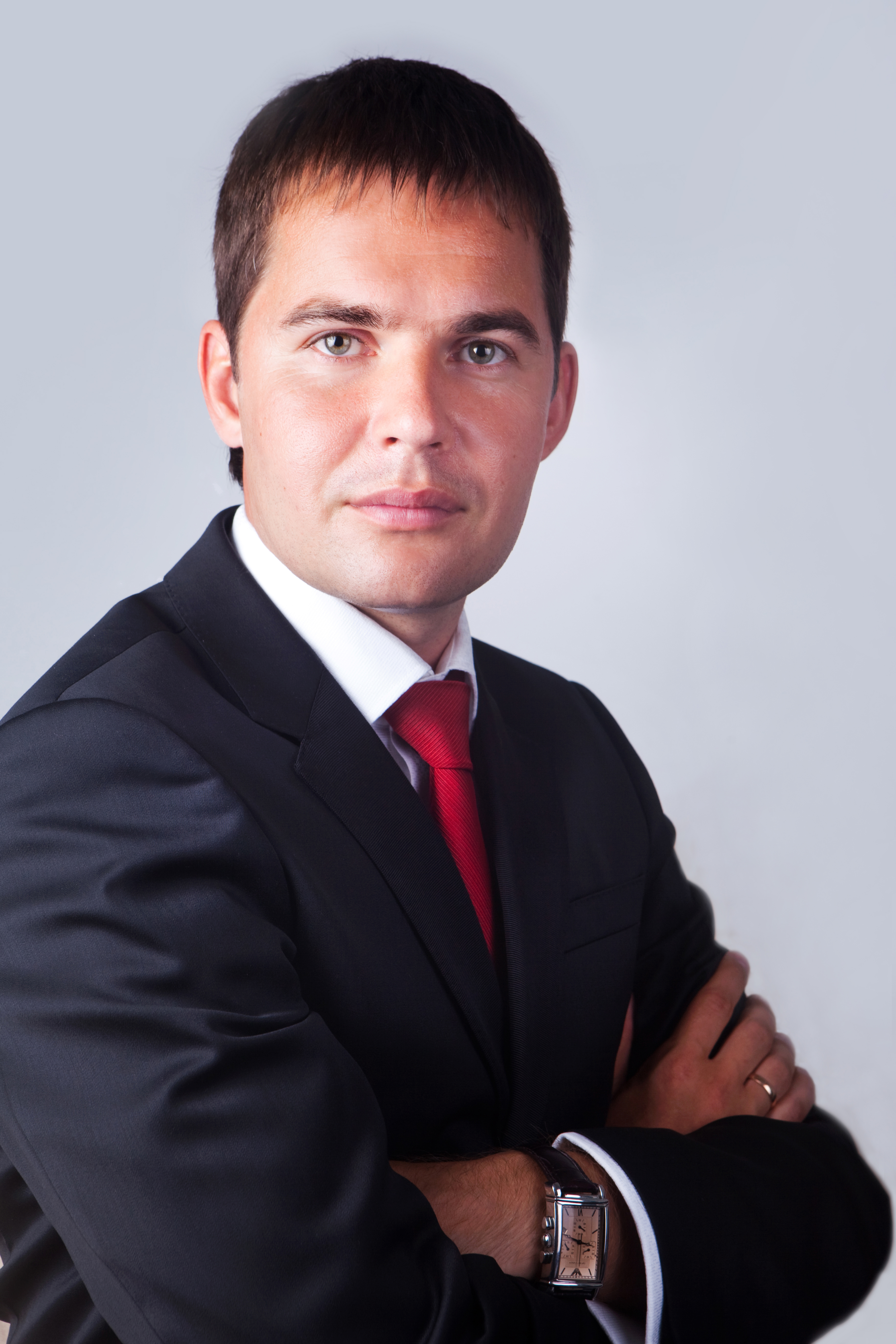 Николай ДегтяренкоEesti: Nikolai Degtjarenko